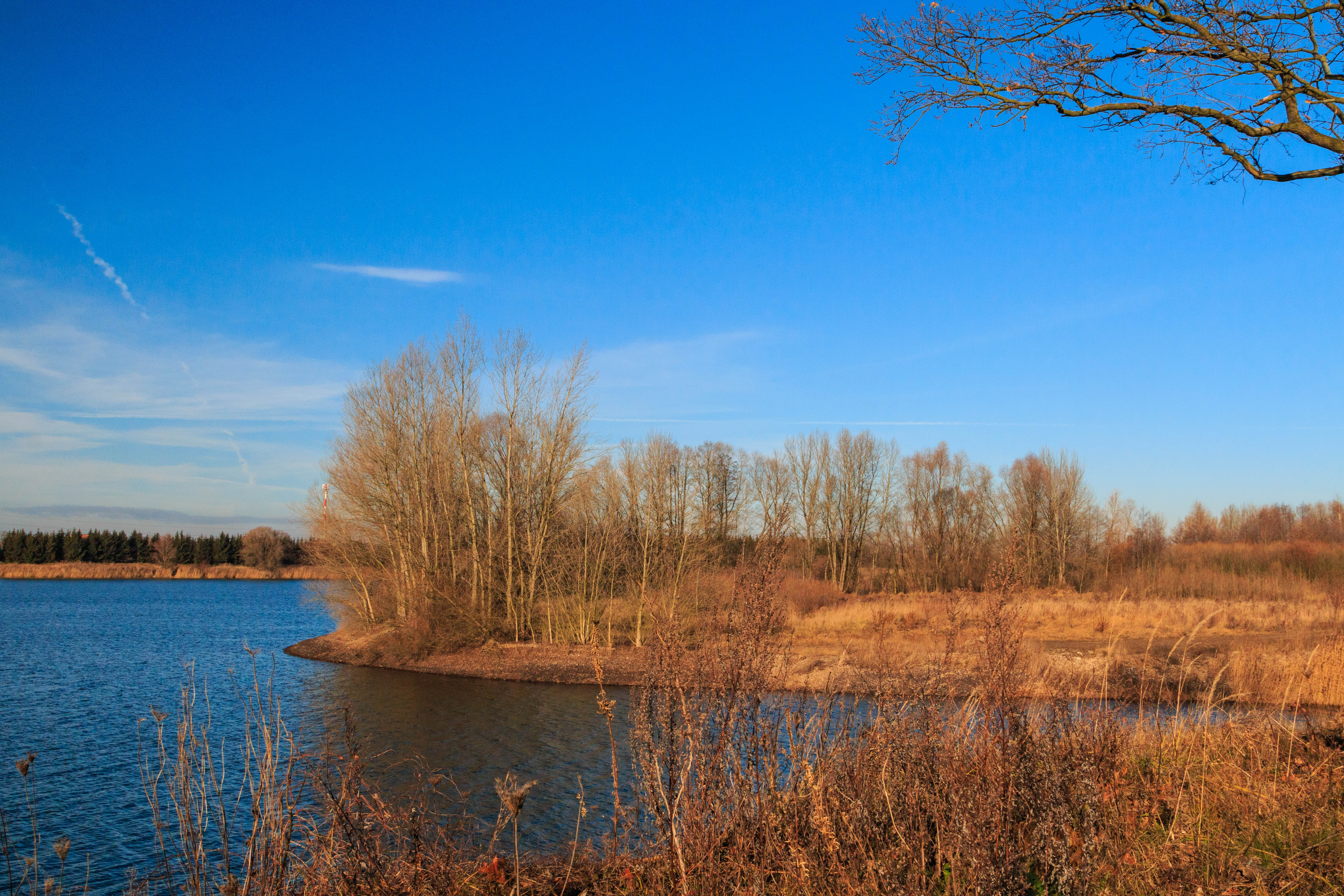 Písník Oplatil II Project: Vodstvo.